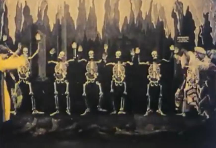 Scene from the movie